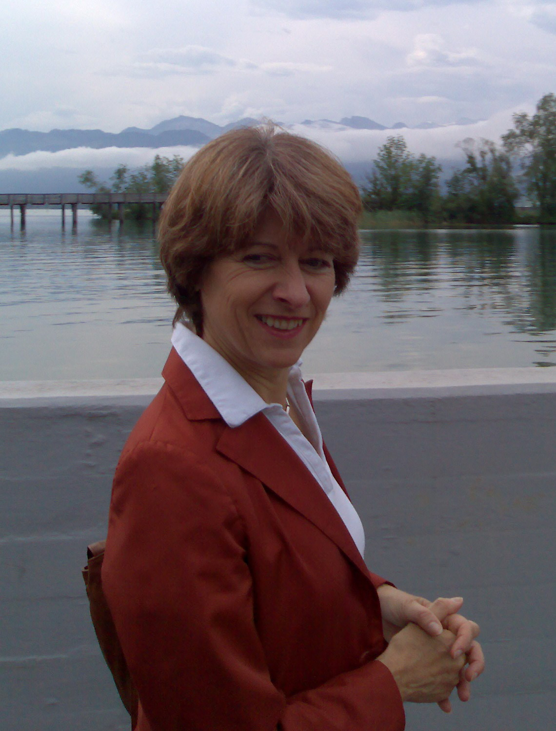 Bundeskanzlerin Annemarie Huber-Hotz in Rapperswil auf dem Schulreisli